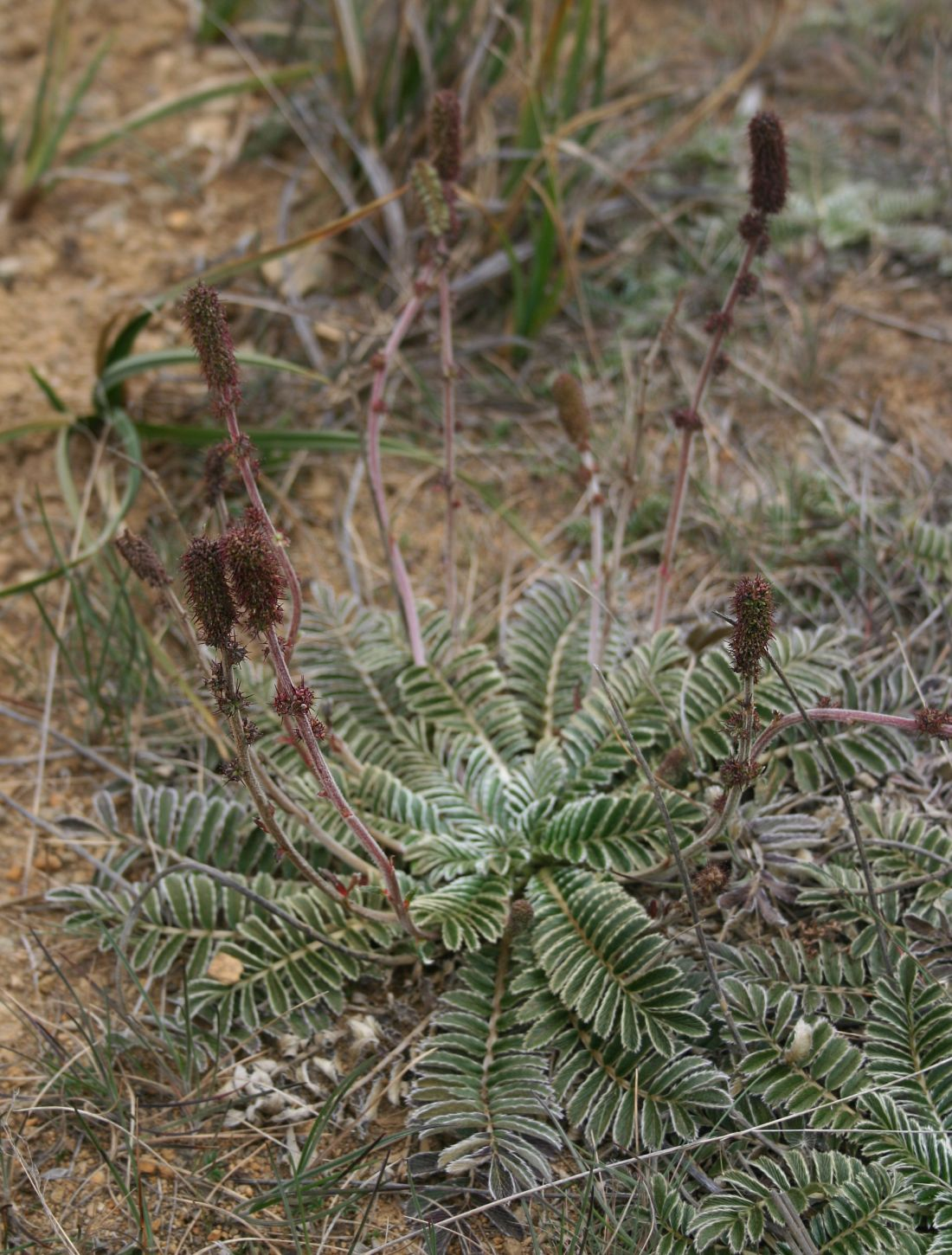 Acaena cylindristachya, Rosaceae - Costa Rica: Prov. San José, Cordillera de Talamanca, Cerro Sákira E Carretera Interamericana, 3200-3300 m